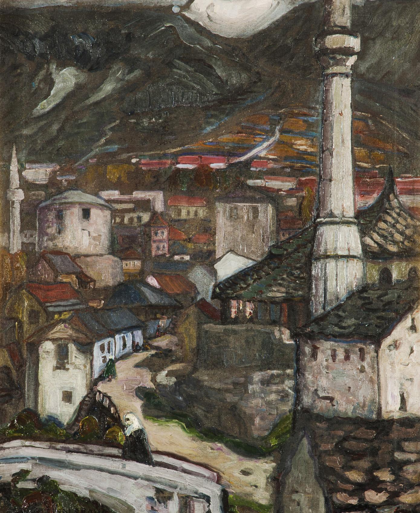 Spanische Szene, links unten signiert: M. Šindlerová, Öl/Leinwand, 81 x 64 cm